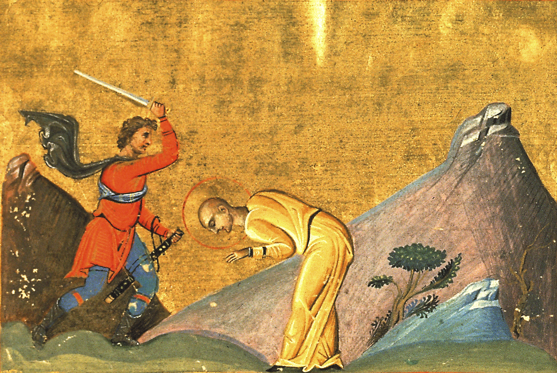 Татьяна Римская Константинополь. 985 г. Миниатюра Минология Василия II. Ватиканская библиотека. Рим.